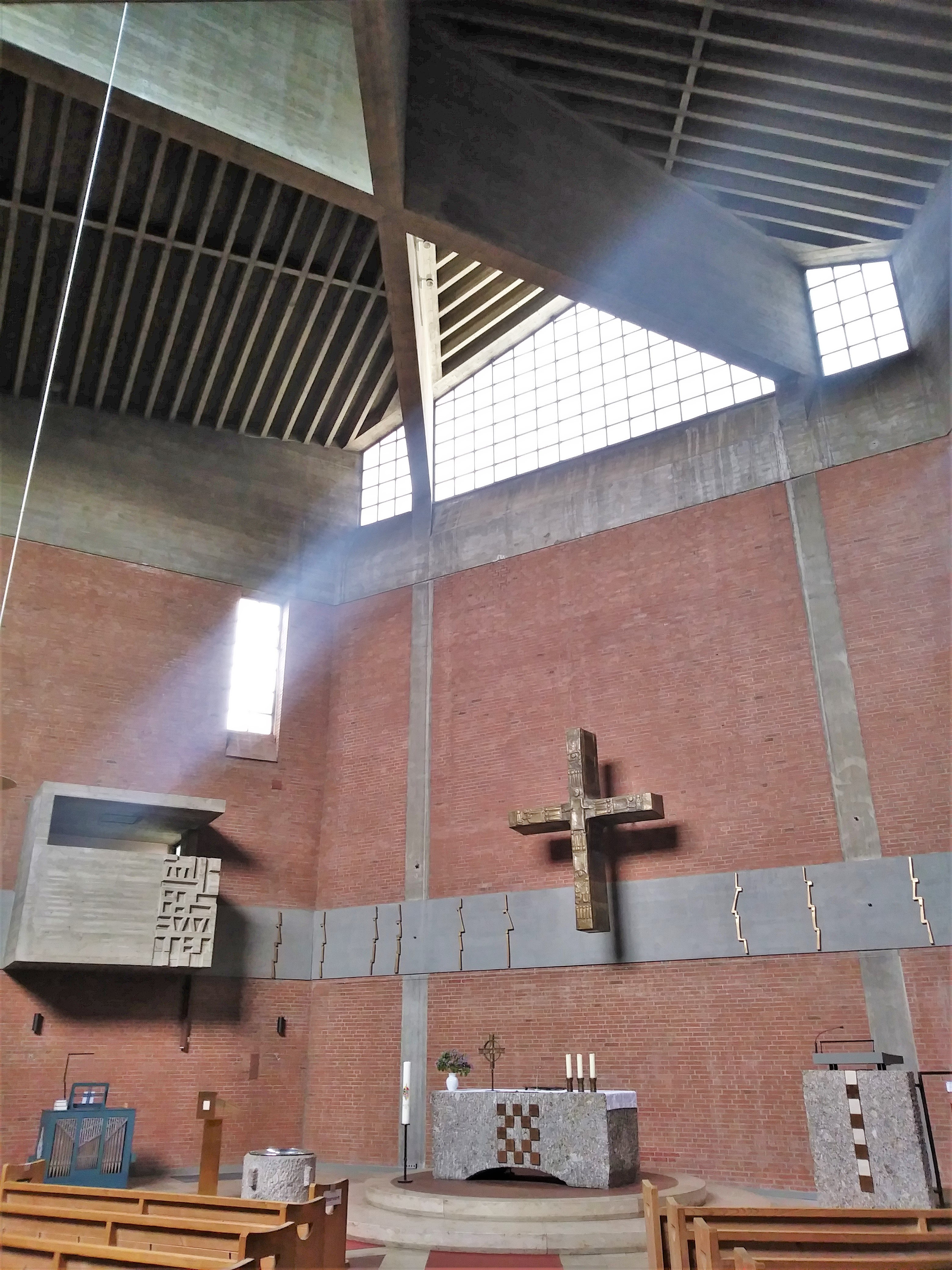 St. Michael (Ottobrunn)